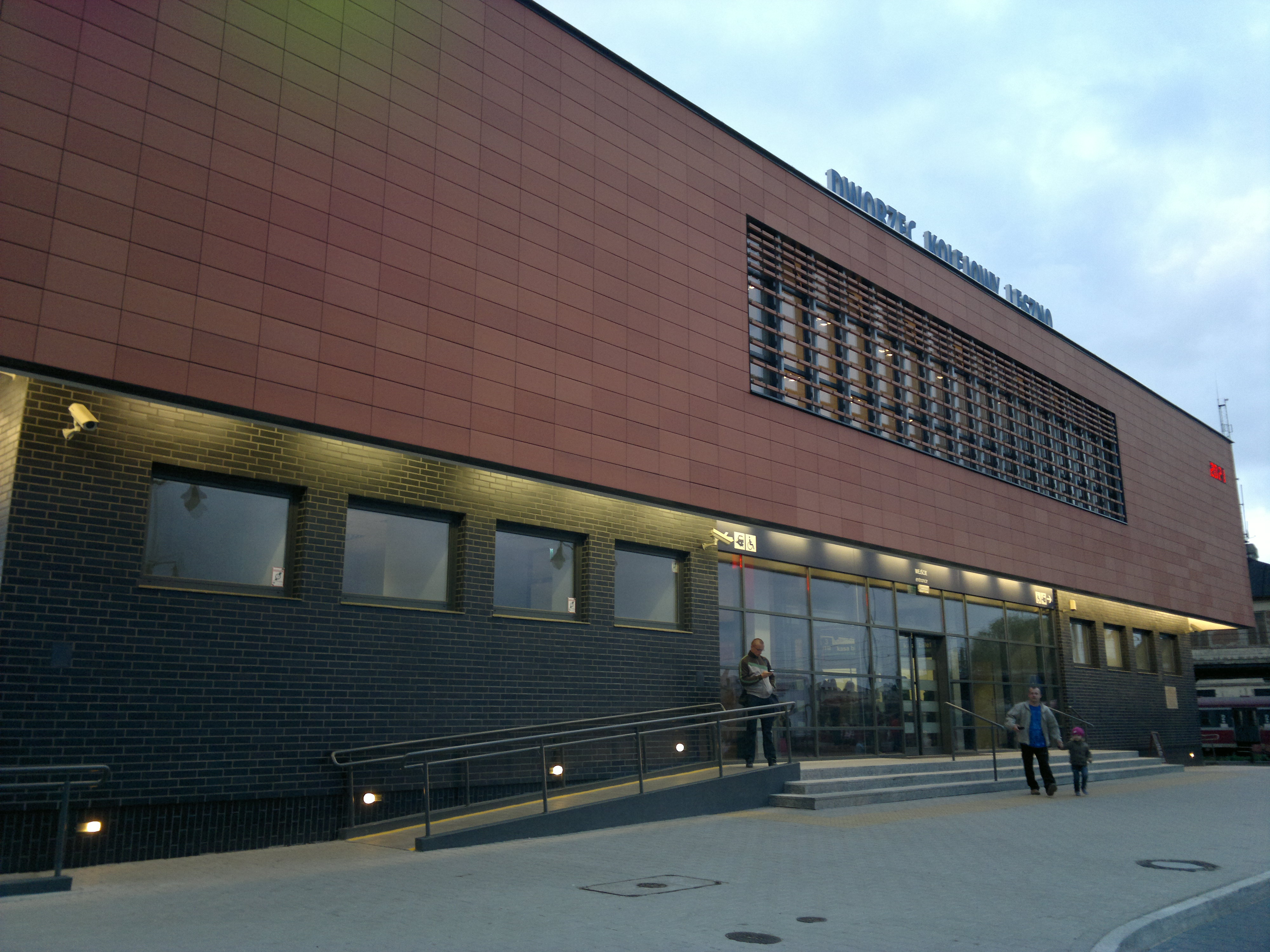 Polska, woj. wielkopolskie, Leszno, Plac przed zmodernizowanym dworcem kolejowym (widok z tarasu budynku)